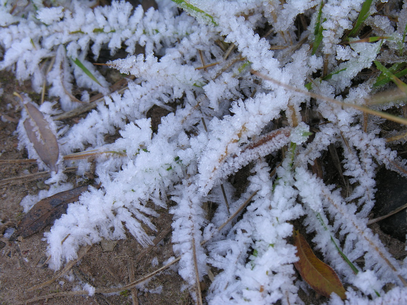 Šarma Foto: Algirdas, 2005 m. lapkričio 1 d.